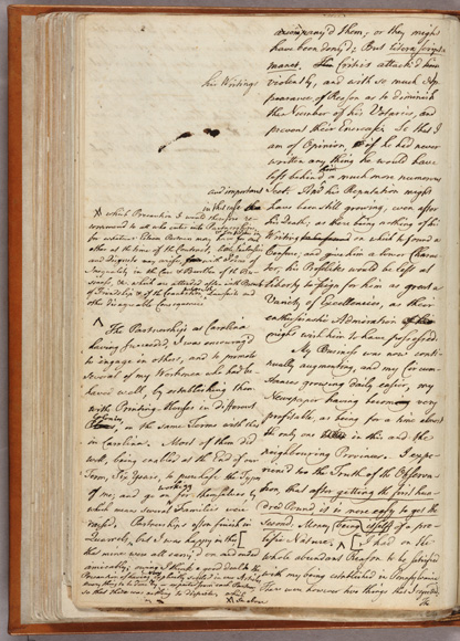 Benjamin Franklin, Autobiography (draft)